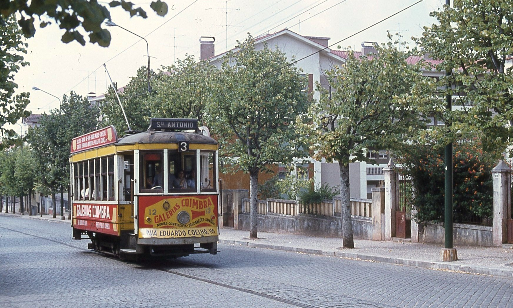 Photo: Trams aux Fils. Ligne 3, direction ST. ANTONIO , tram 12 en 1978, (ligne disparue le 09-02-1980) Selon Pedro Rodrigues Costa la motrice 12 a été démolie.